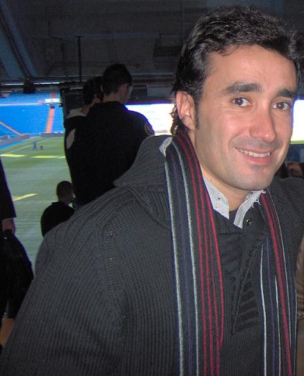 Juanma Castaño en el Estadio Santiago Bernabéu